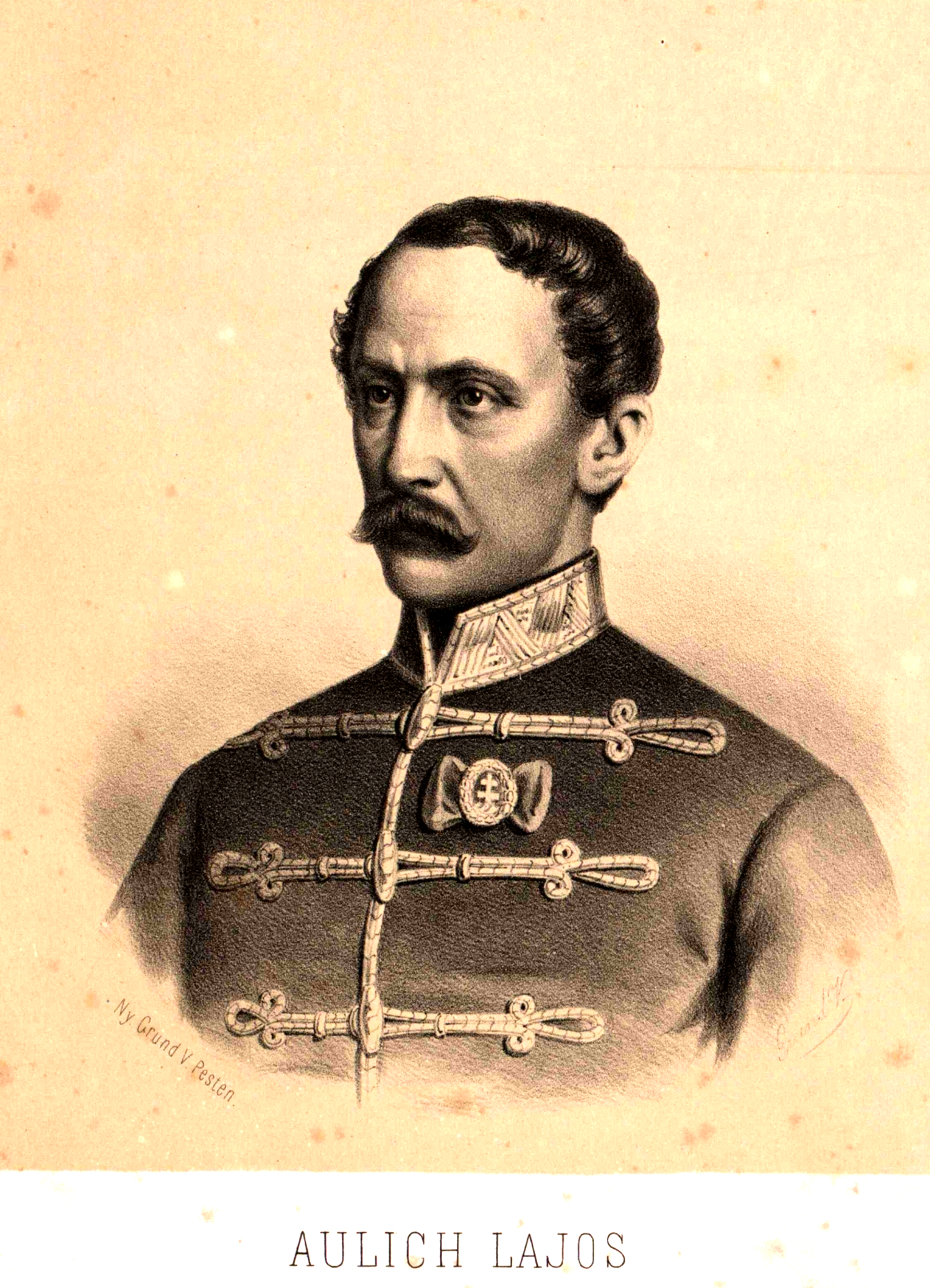 Aulich, Ludwig (um 1792 - 1849) Feldherr, Krieg, Militär, Porträt